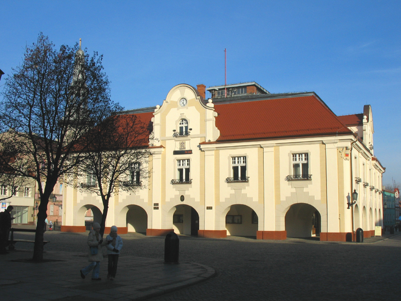 Ratusz na Rynku w Jarocinie